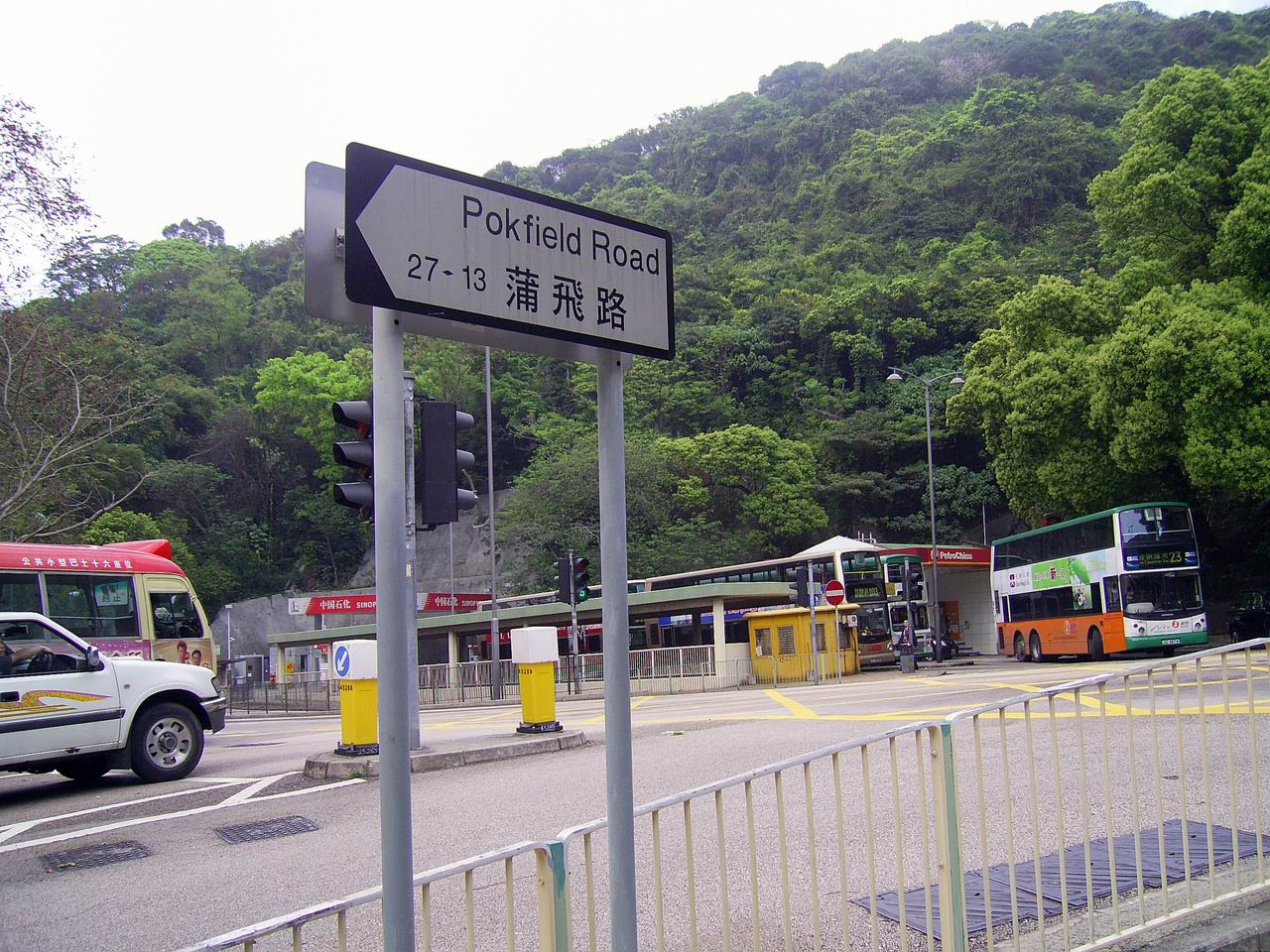 蒲飛路